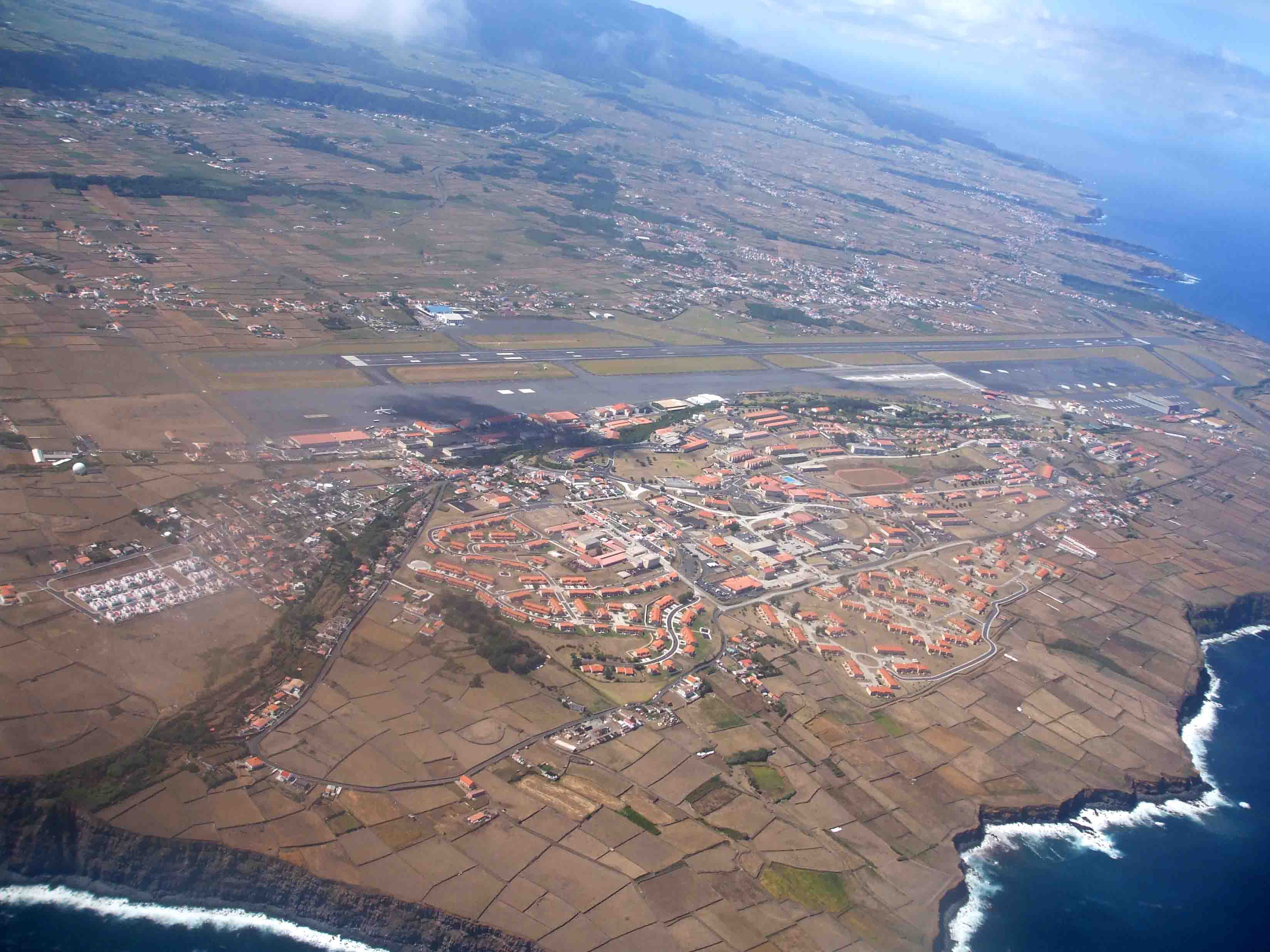 Base aérea da Lajes, ilha Terceira, Açores, Portugal.